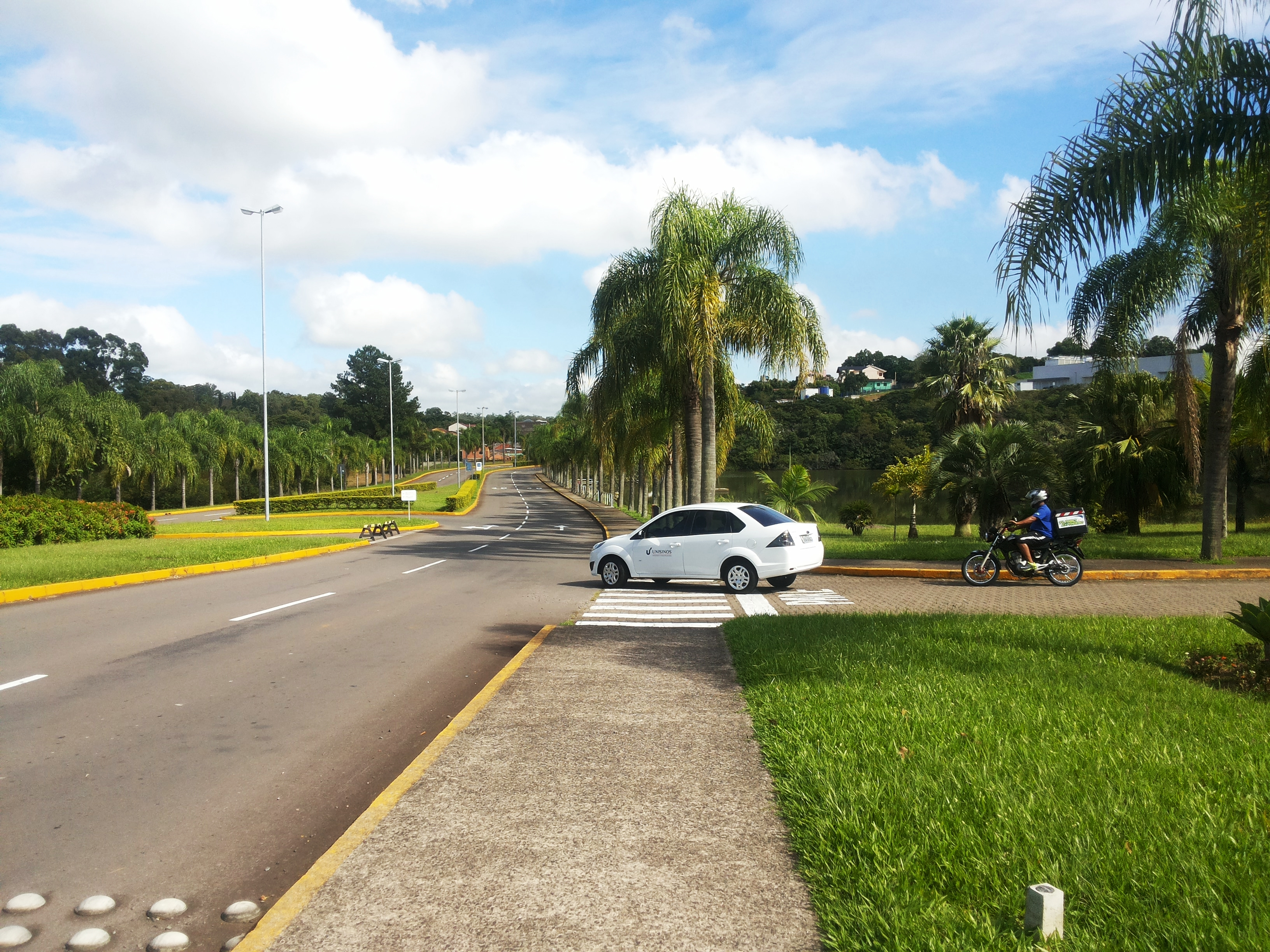 Acesso ao Campus pelo portão 1.